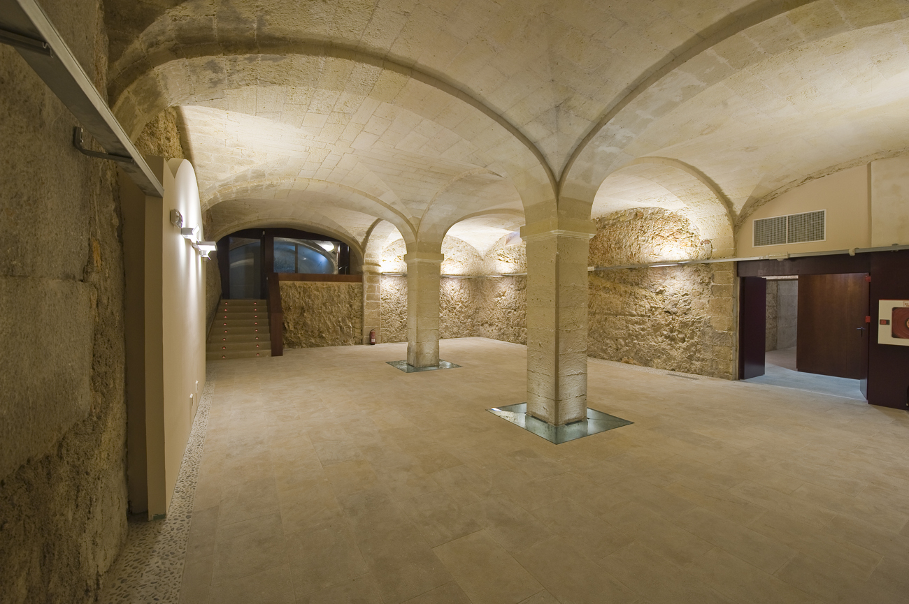 Soterrani de la Institució Alcover